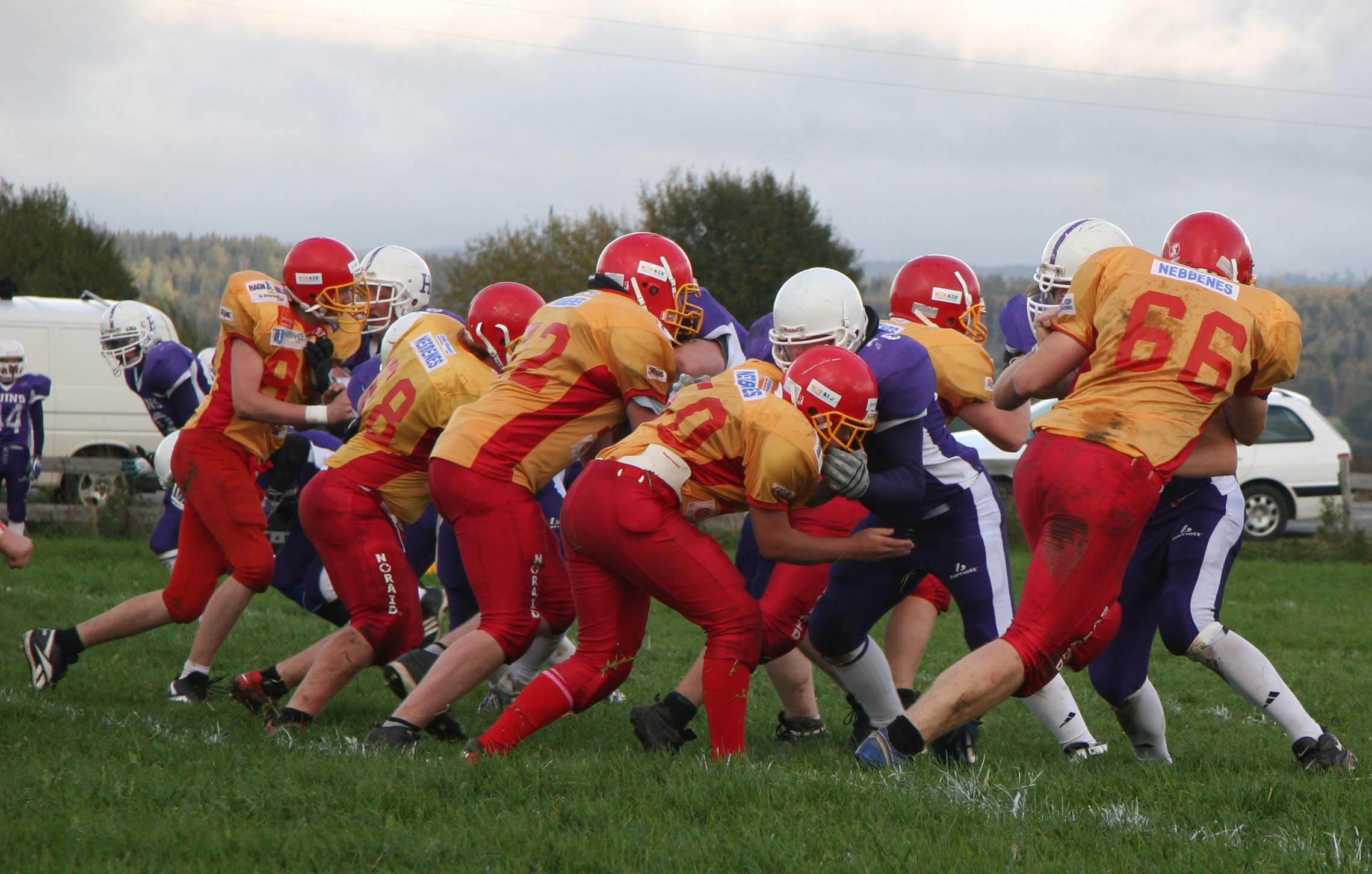 Eidsvoll 1814s U19 vs Hamar Ruins 7 Okt 2006, Bøn stadion Eidsvoll Norway.